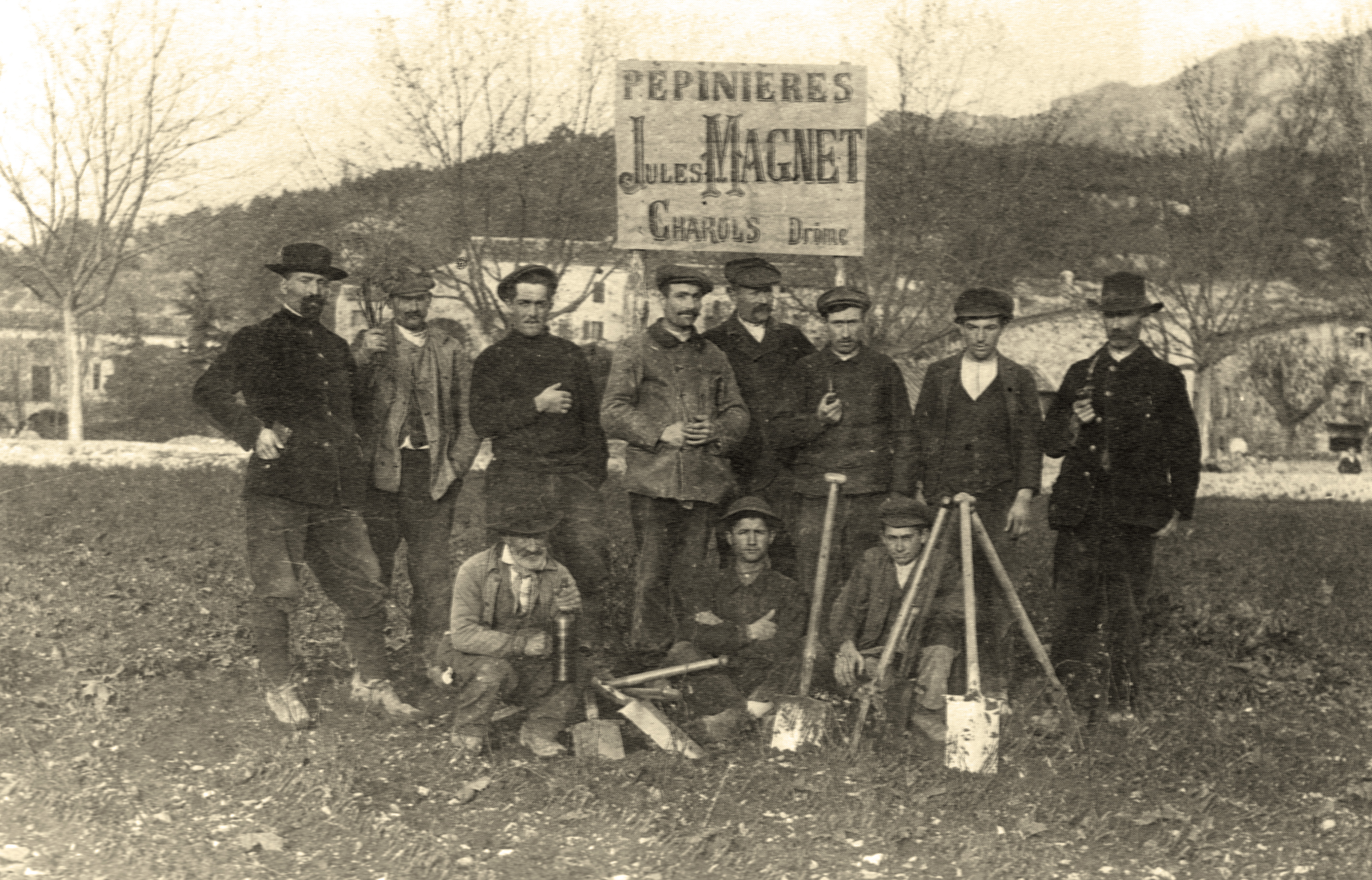 Pépinière viticole Jules Magnet en 1904 dans la Drôme